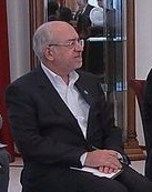 Mohammadreza Nematzadeh, 13 September 2013